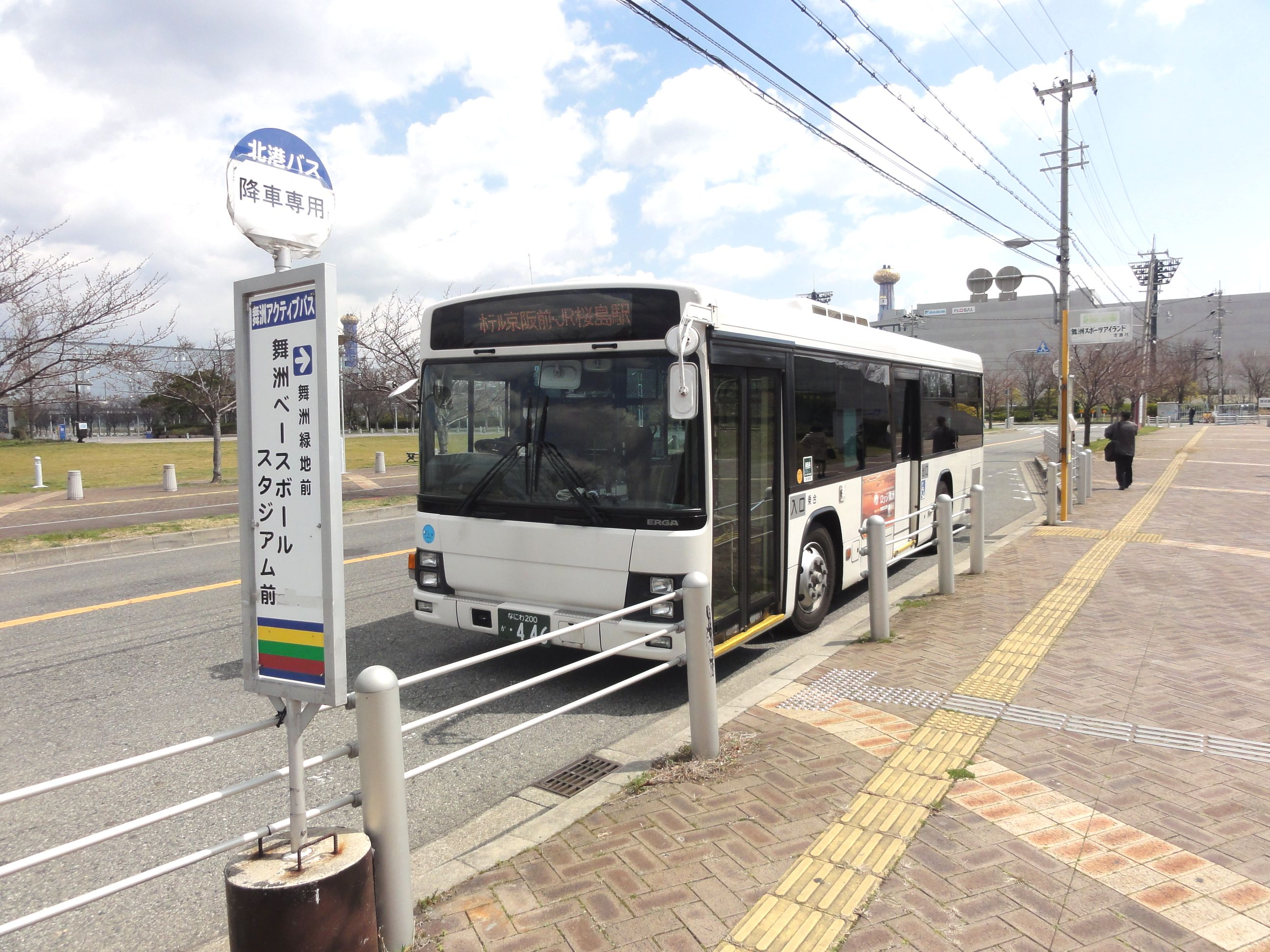 舞洲ベースボールスタジアム前バス停